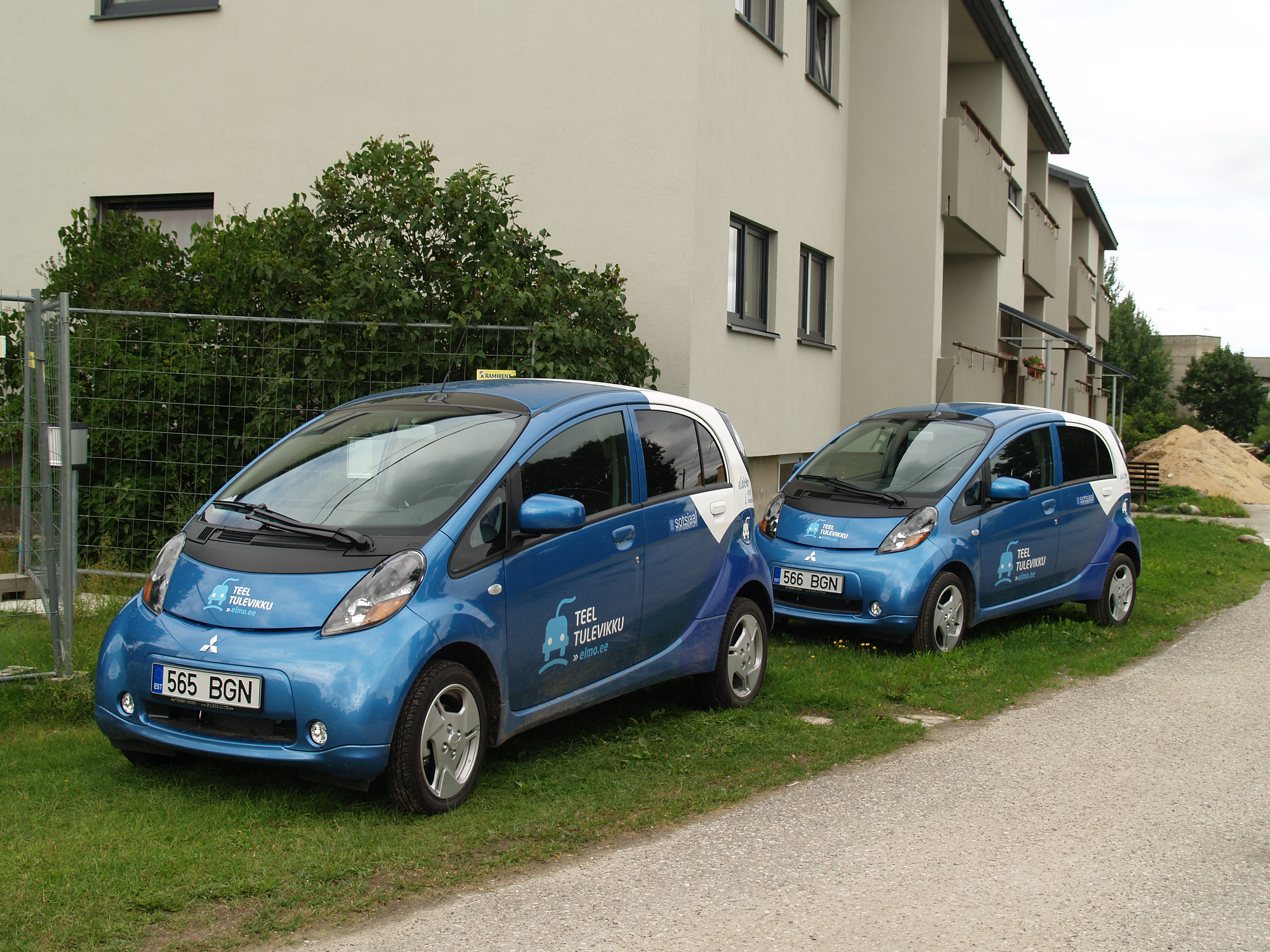 Mitsubishi iMiev elektriautod Eestis